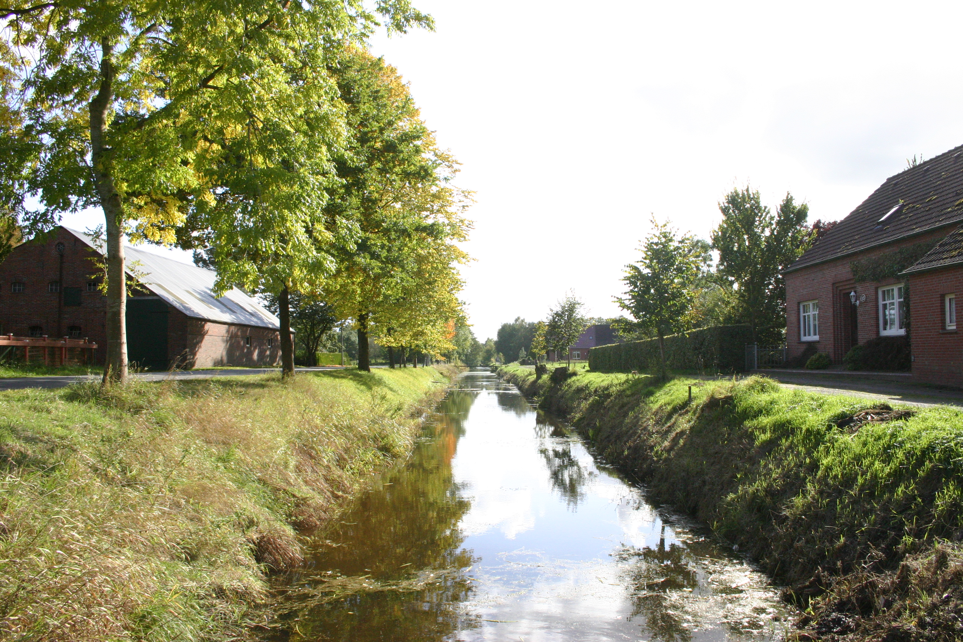 Neuefehnkanal in Neuefehn (Gemeinde Neukamperfehn)